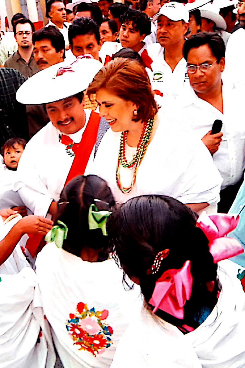 Sari Bermudez Presidenta Conaculta 2000-2006